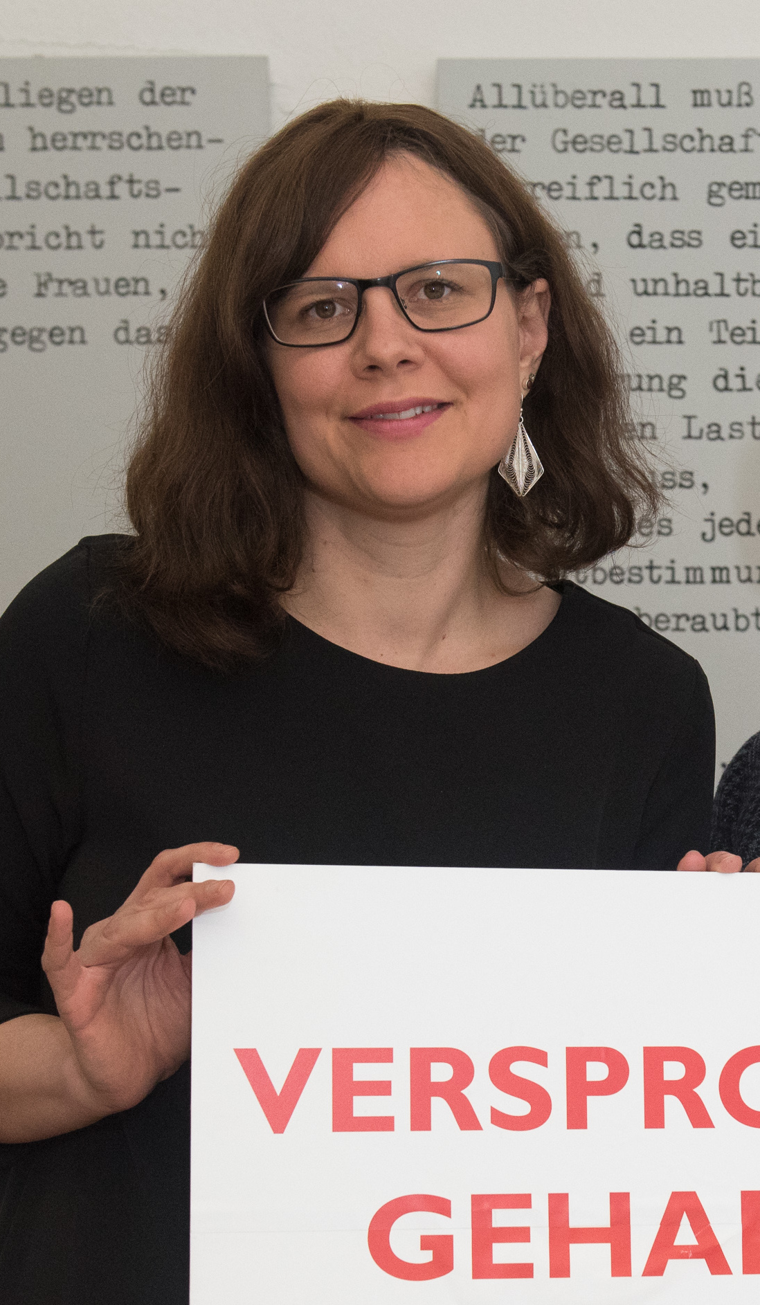 PK Frauenpensionsantrittsalter am 19. Feb. 2016 mit Frauenministerin Gabriele Heinisch-Hosek und SPÖ-Bundesfrauengeschäftsführerin Andrea Brunner